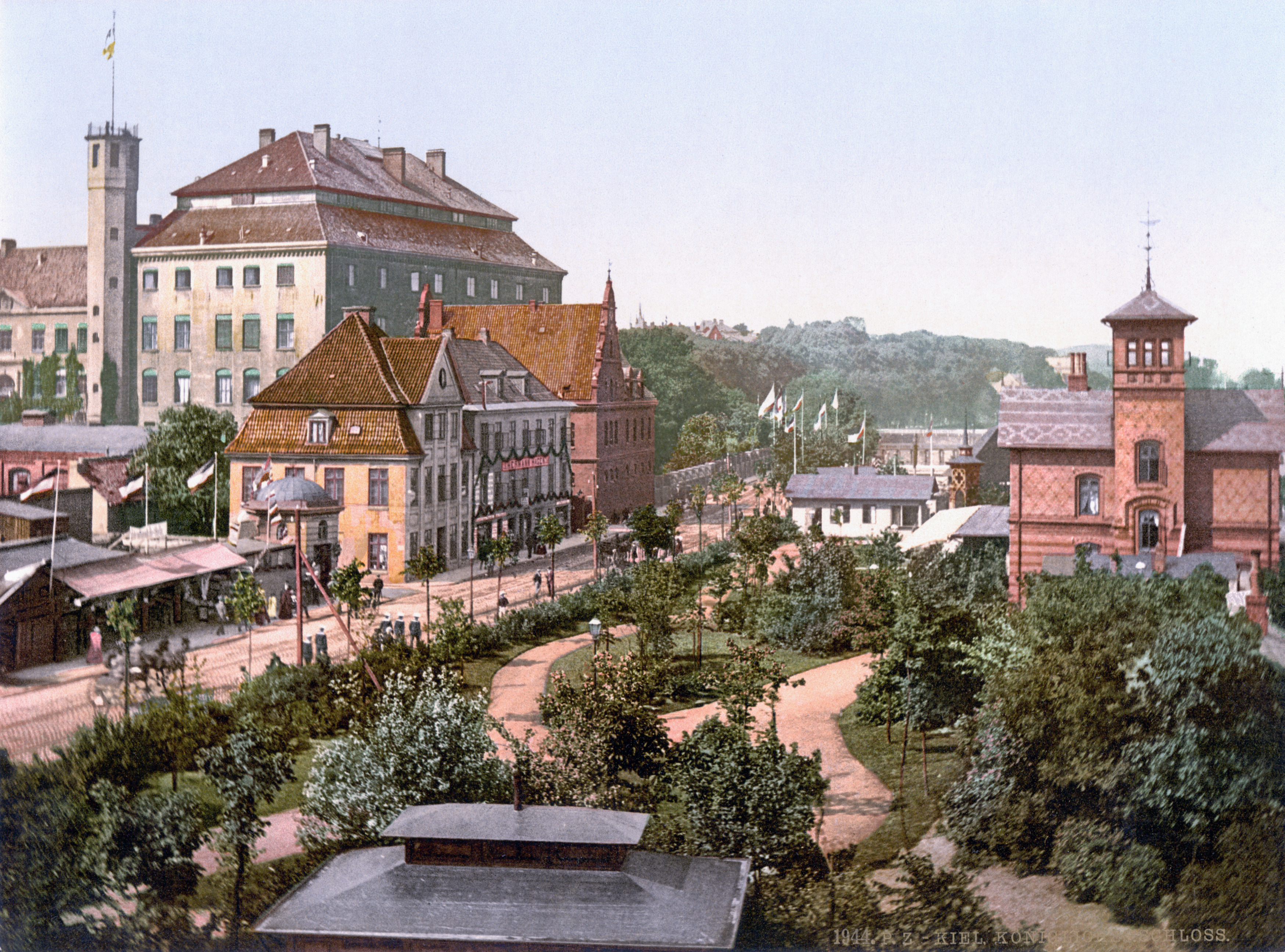 Königliches Schloss Kiel